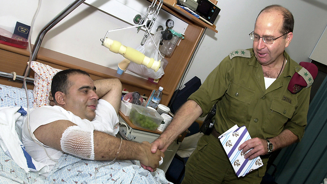 אלוף משנה, פנחס "פינקי" זוארץ לוחץ את ידו של הרמטכ"ל, רא"ל משה בוגי יעלון בבית החולים סורוקה לאחר שנפצע מפיצוץ מטען חבלה ליד היישוב מורג בגוש קטיף, בעת שנסע בג'יפ הפיקוד.